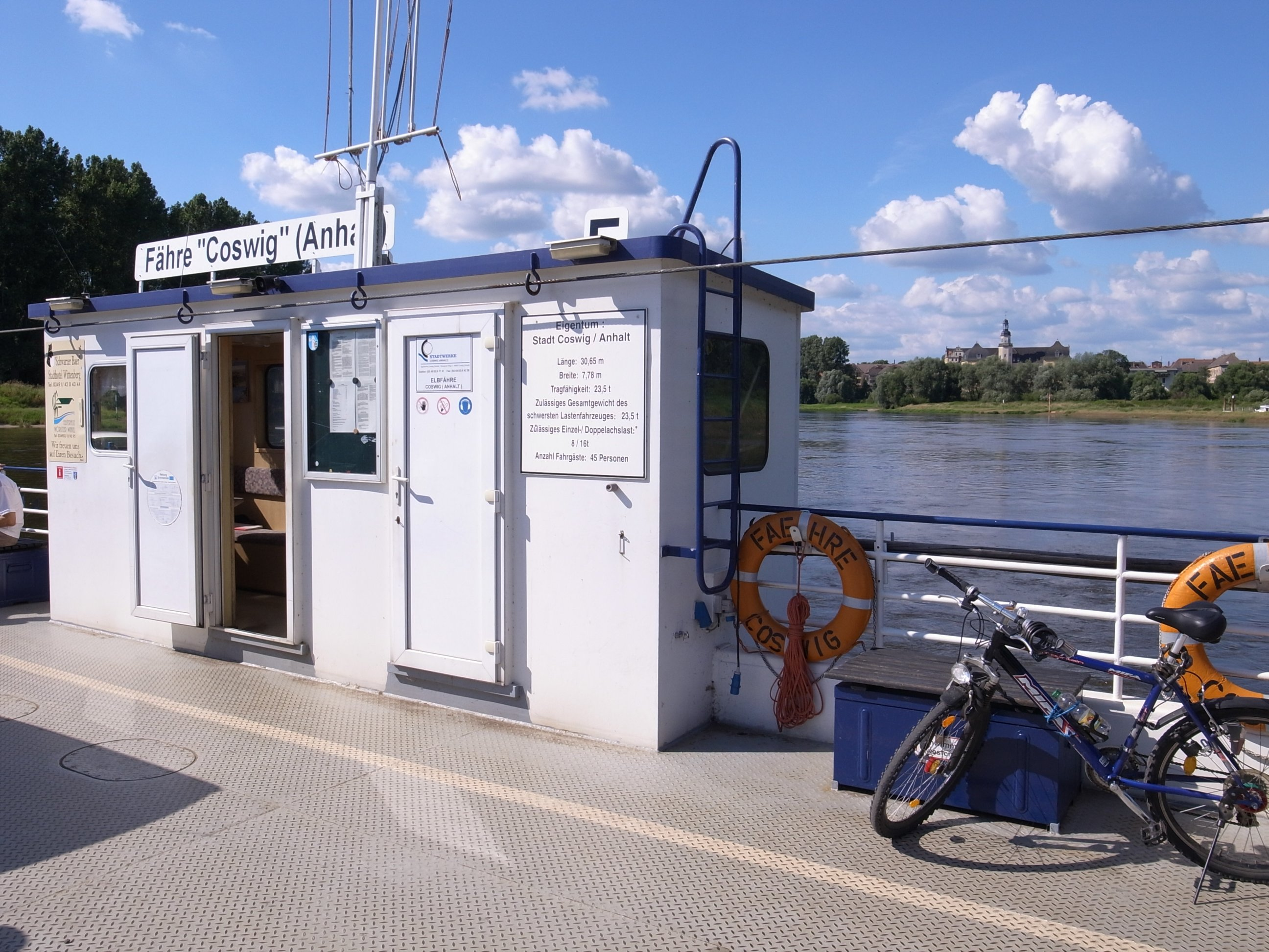 Coswig (Anhalt), Fähre, Technische Daten